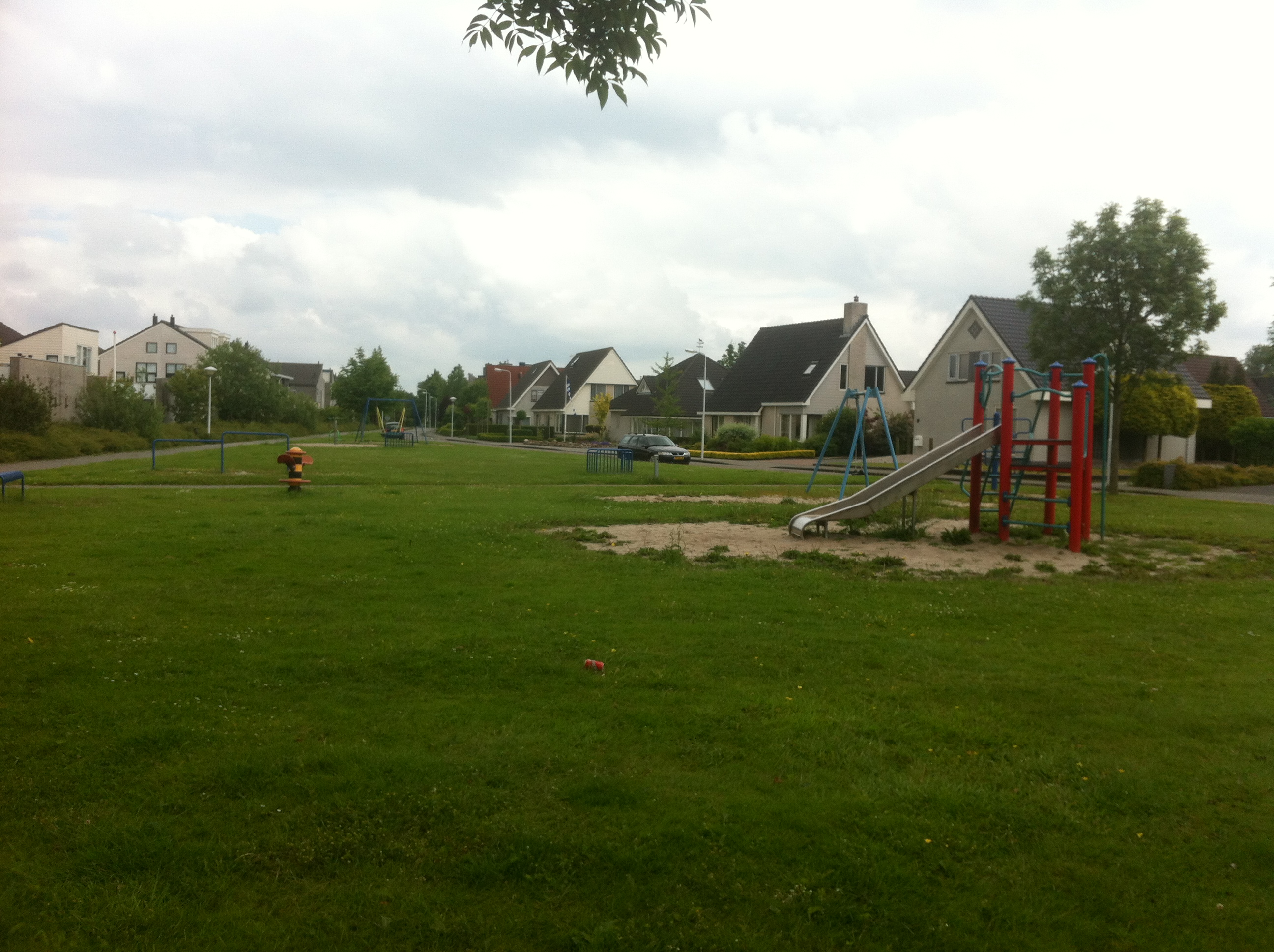 Woonwijk De Peppel in Drachten